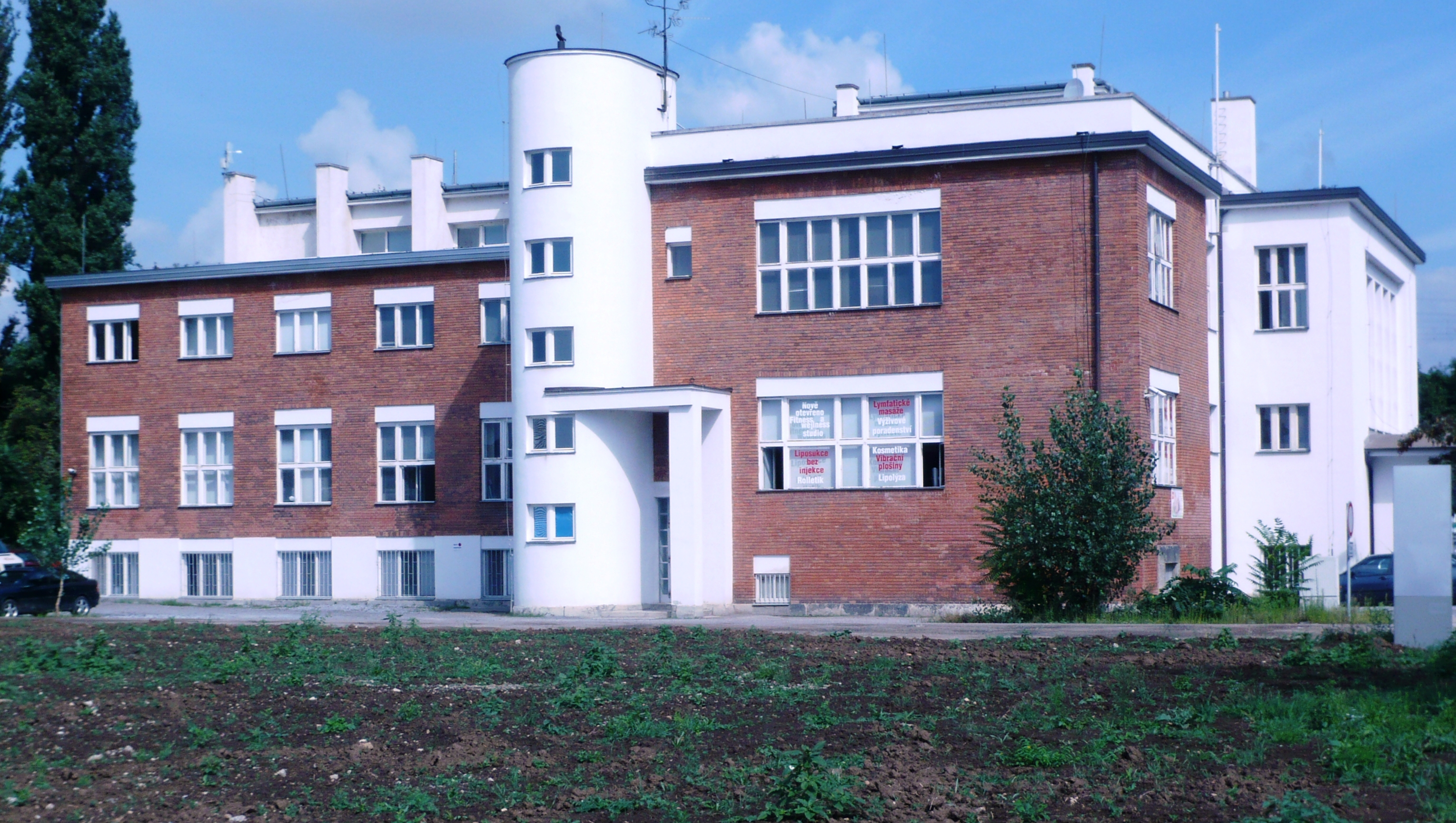 Masná Burza- Brno